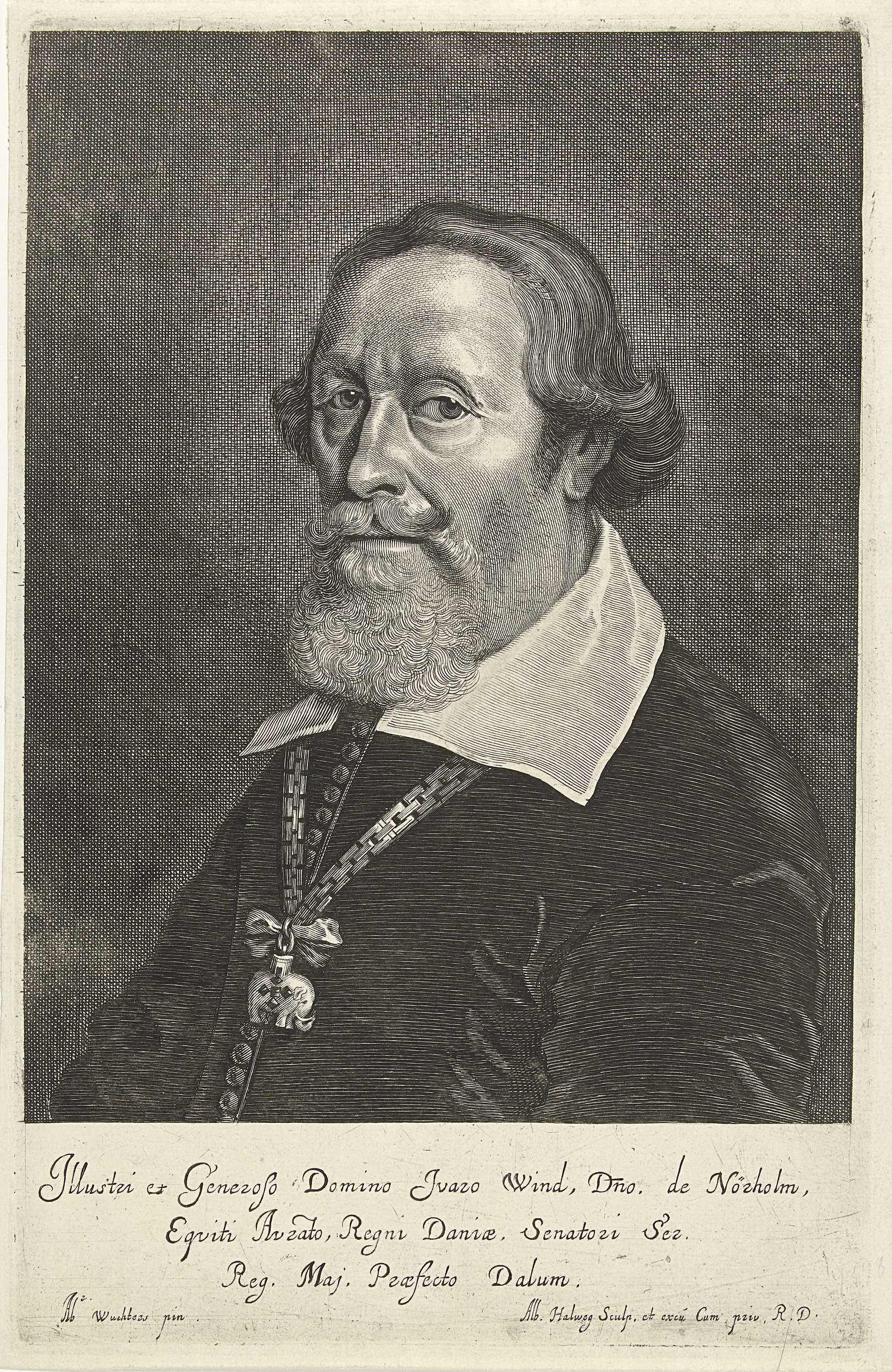 Portræt af Ivar Wind (Portret van Ivar Wind)